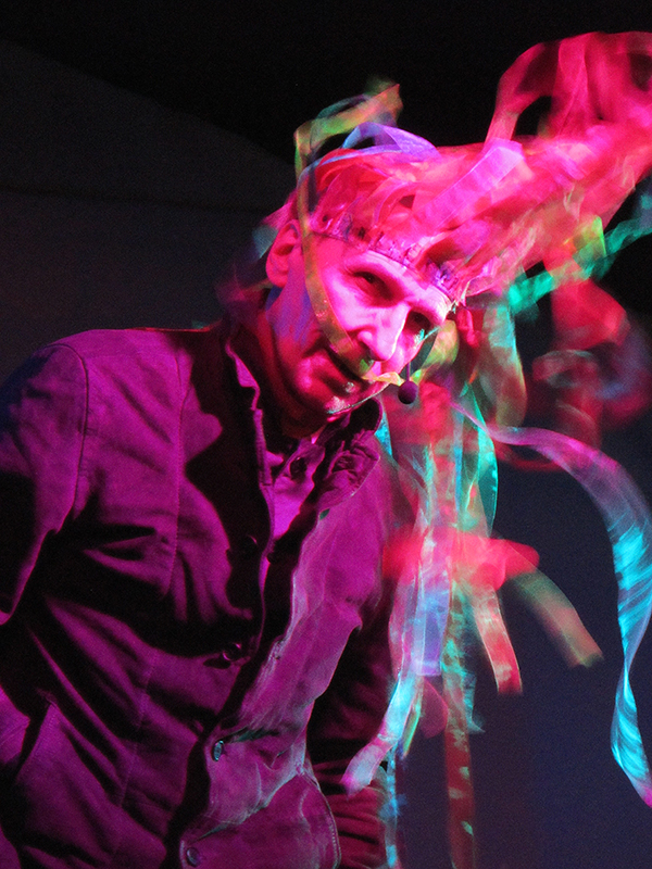 Мамонов в клубе "Гоголь" 24.05.2013